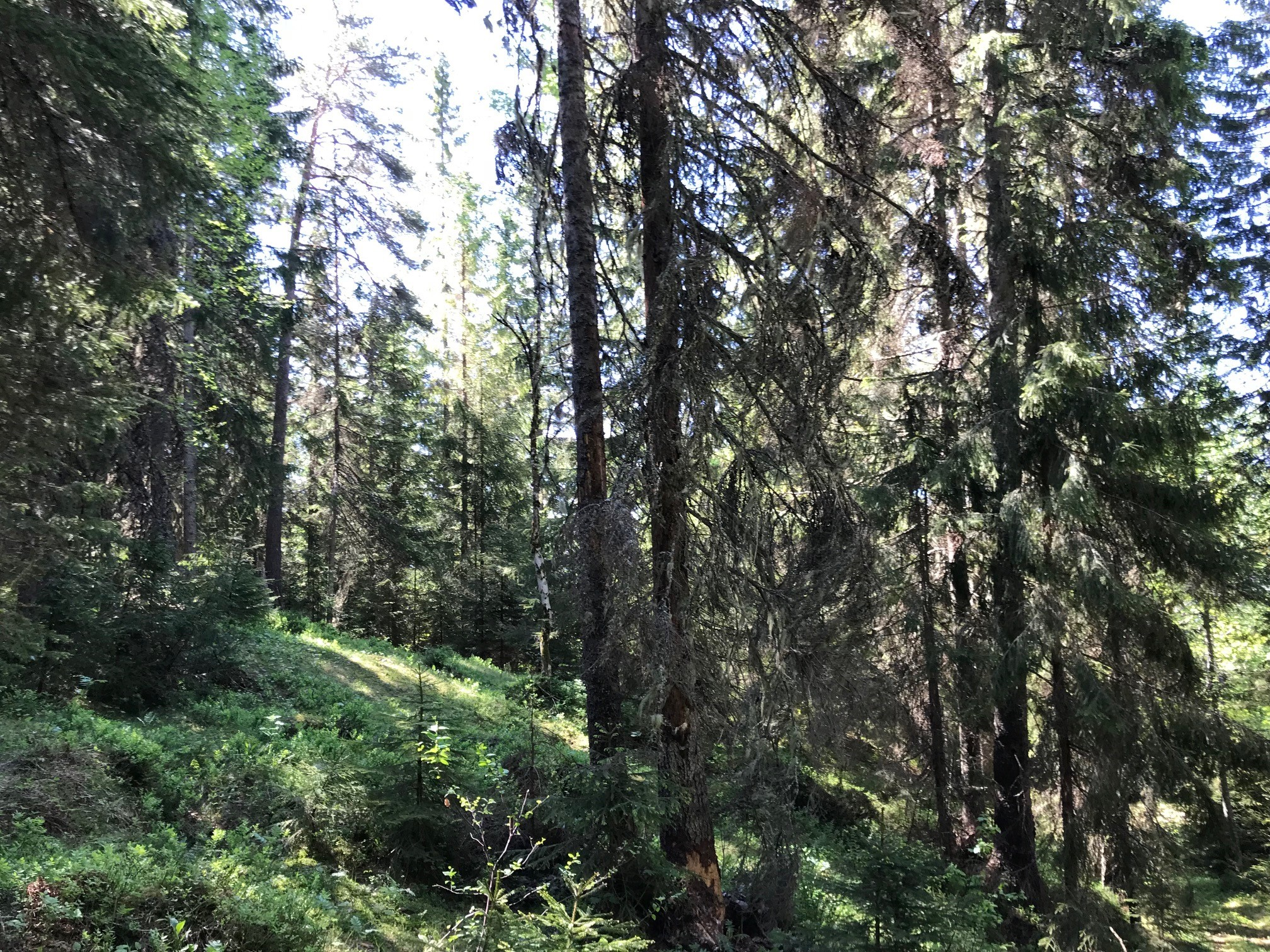 Gran og furu i St. Hansåsen naturreservat